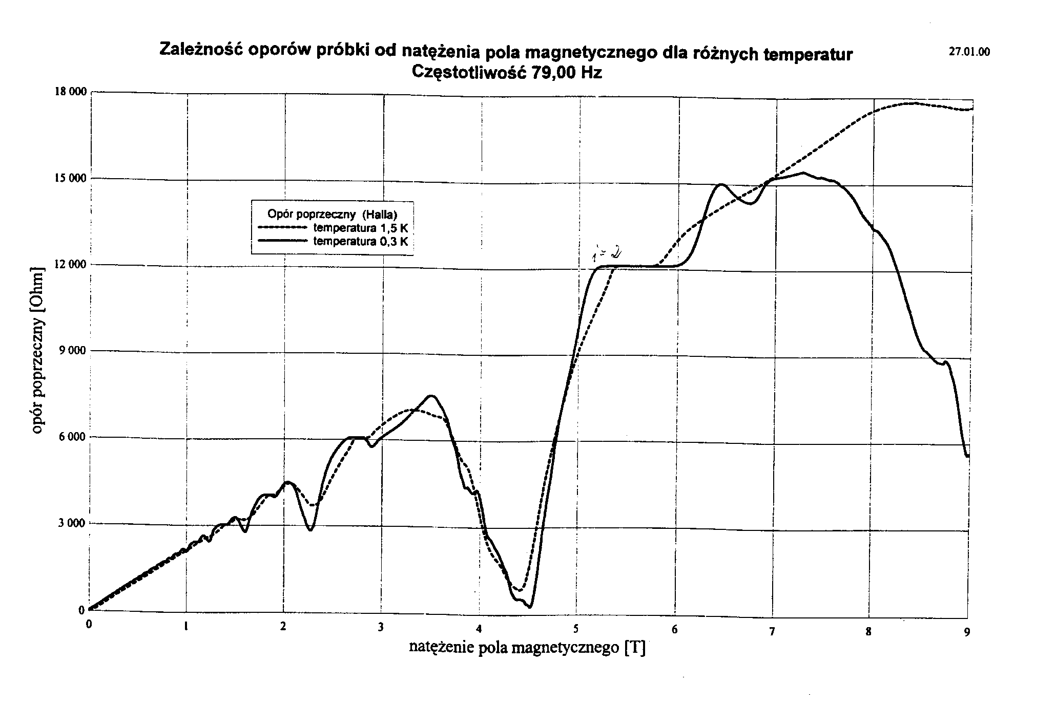 Kwantowy Efekt Halla. Widoczne "schodki" - wartości skwantowanego oporu elektrycznego. Pomiary wykonane dla 2 temperatur. Pomiary wykonane w Instytucie Fizyki PAN we Warszawie al. Lotników w dniu 27.01.2000